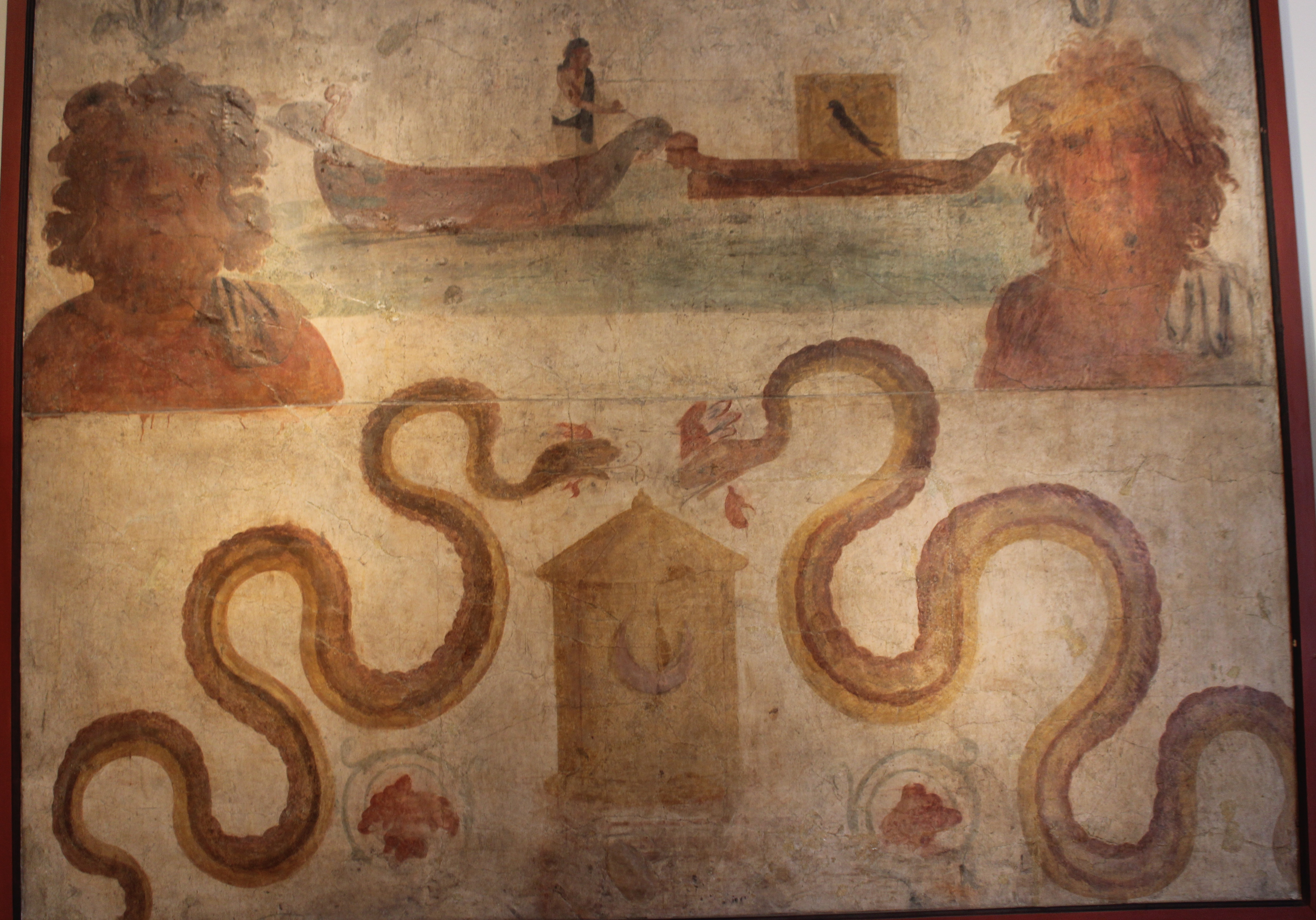 L'affresco con il Navigium Isidis, rinvenuto nel Sacrarium del Tempio di Iside a Pompei, è esposto nel Museo Archeologico Nazionale di Napoli (inv. 8929) (cat. 1.74). Fra due busti di divinità fluviali vi sono due imbarcazioni di giunchi, sulla sinistra delle quali vi è Iside che traina con una fune la barca di destra sulla quale vi è una cassa quadrata con un falco dipinto sopra. Al di sotto vi sono due grandi serpenti affrontati ai lati di una cesta di vimini con coperchio conico.